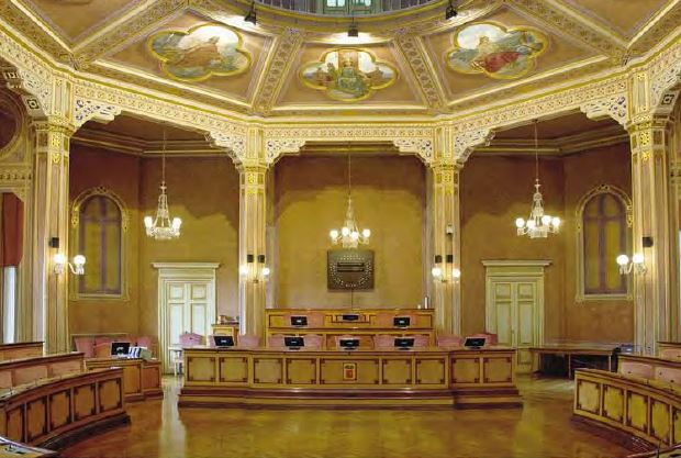 Sala del Palazzo della Provincia